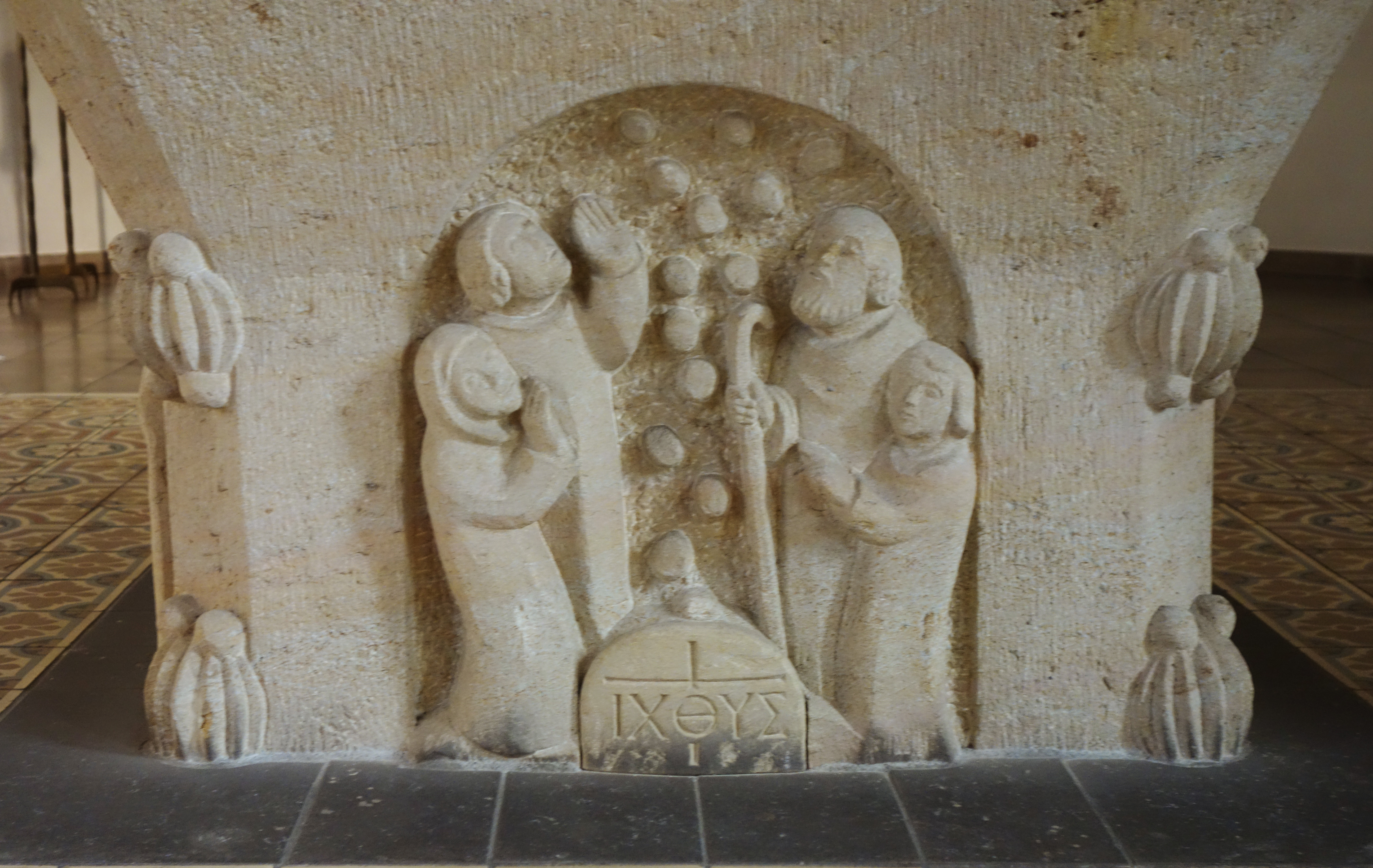 Pfarrkirche St. Maria-St. Vicelin, Neumünster, Vorderseite des Altars